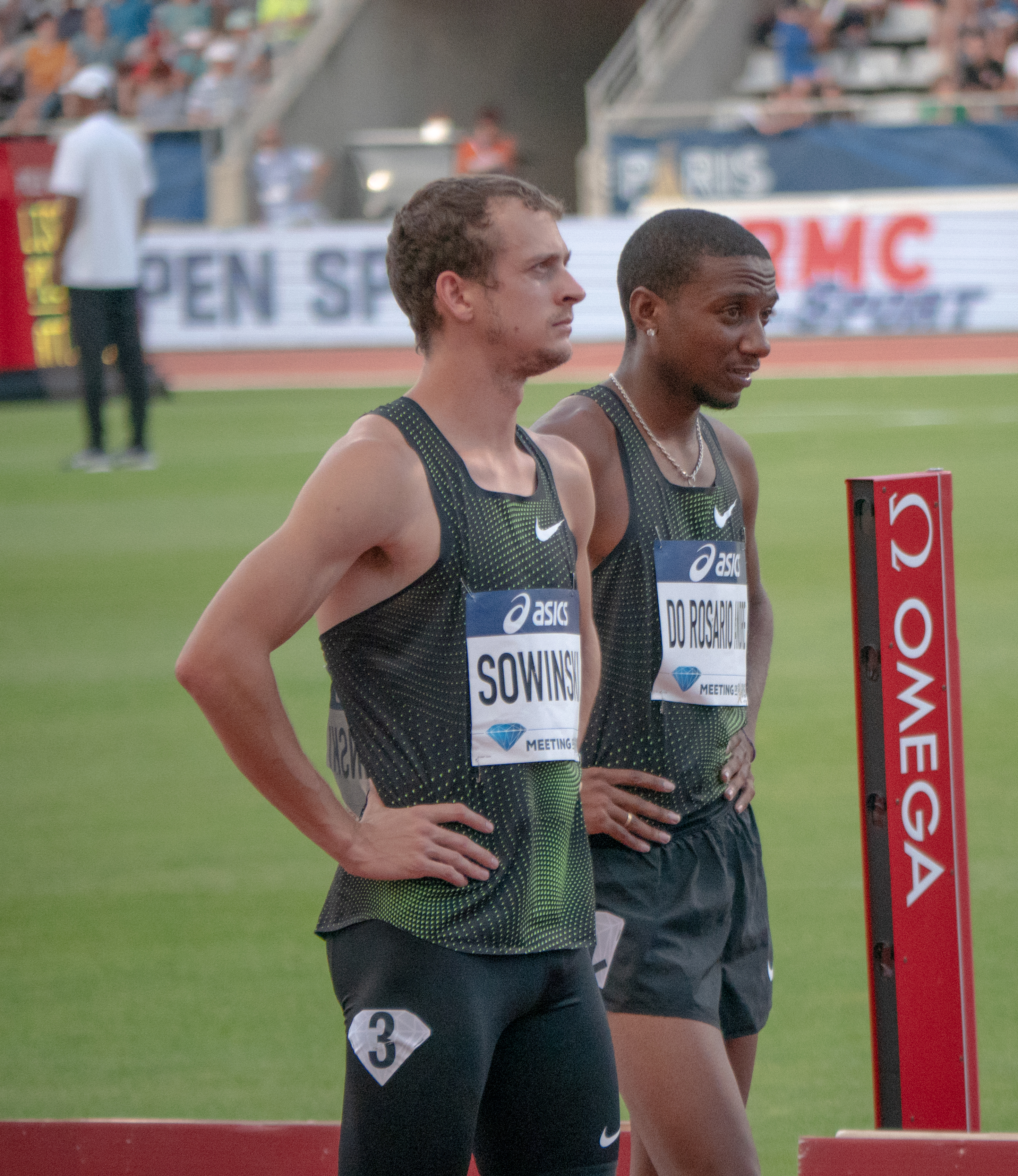 Erik Sowinski et Thiago Do Rosario Andre